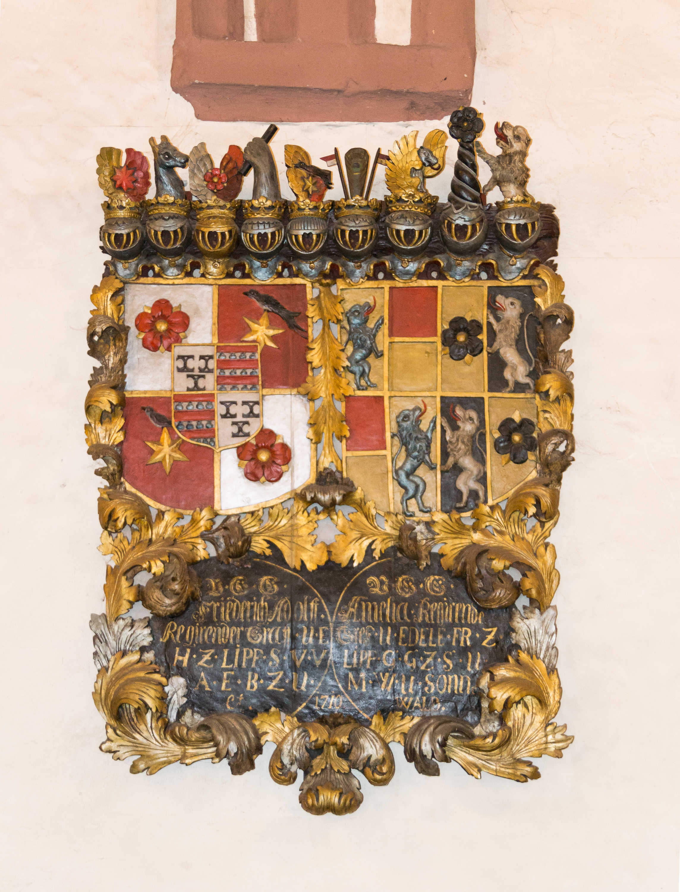 Marktkirche Lage, Stiftertafel zur Orgel (mit Blitz)